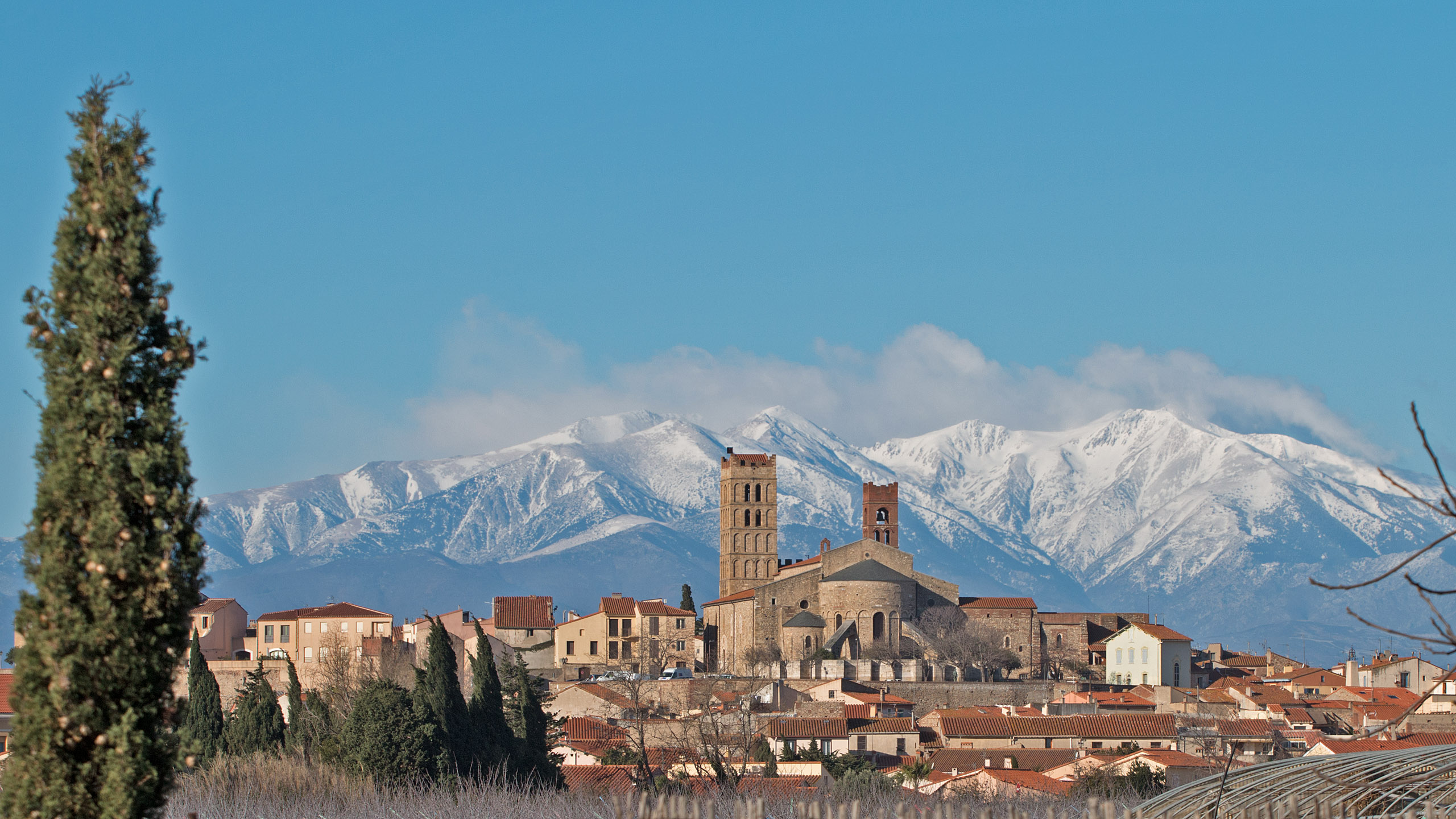 Elne sur fonde Canigou enneigé